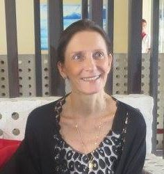 Corinne Breuzé, Botschafterin Frankreichs in Indonesien und Osttimor